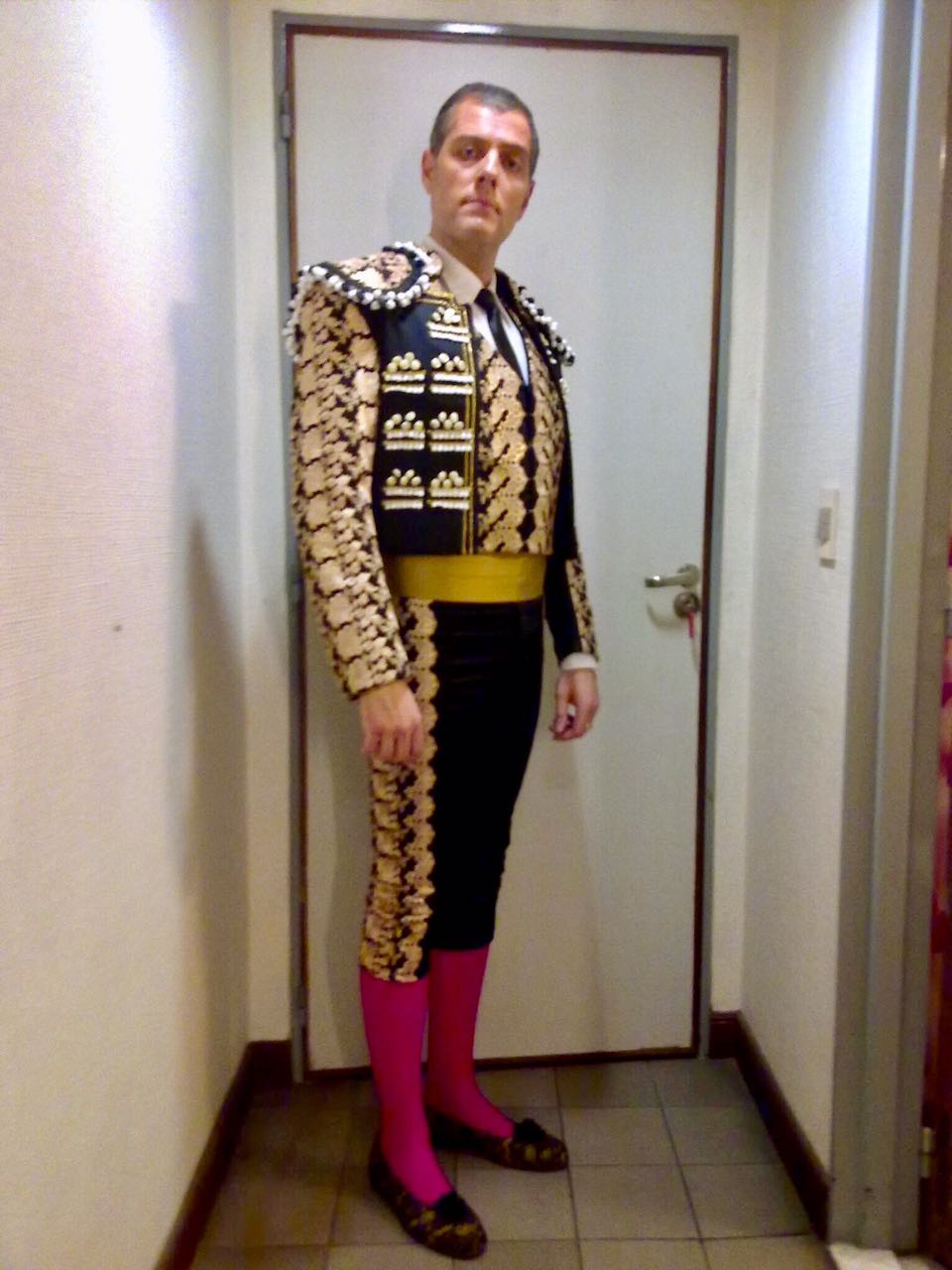 Leonardo Estévez como Escamillo